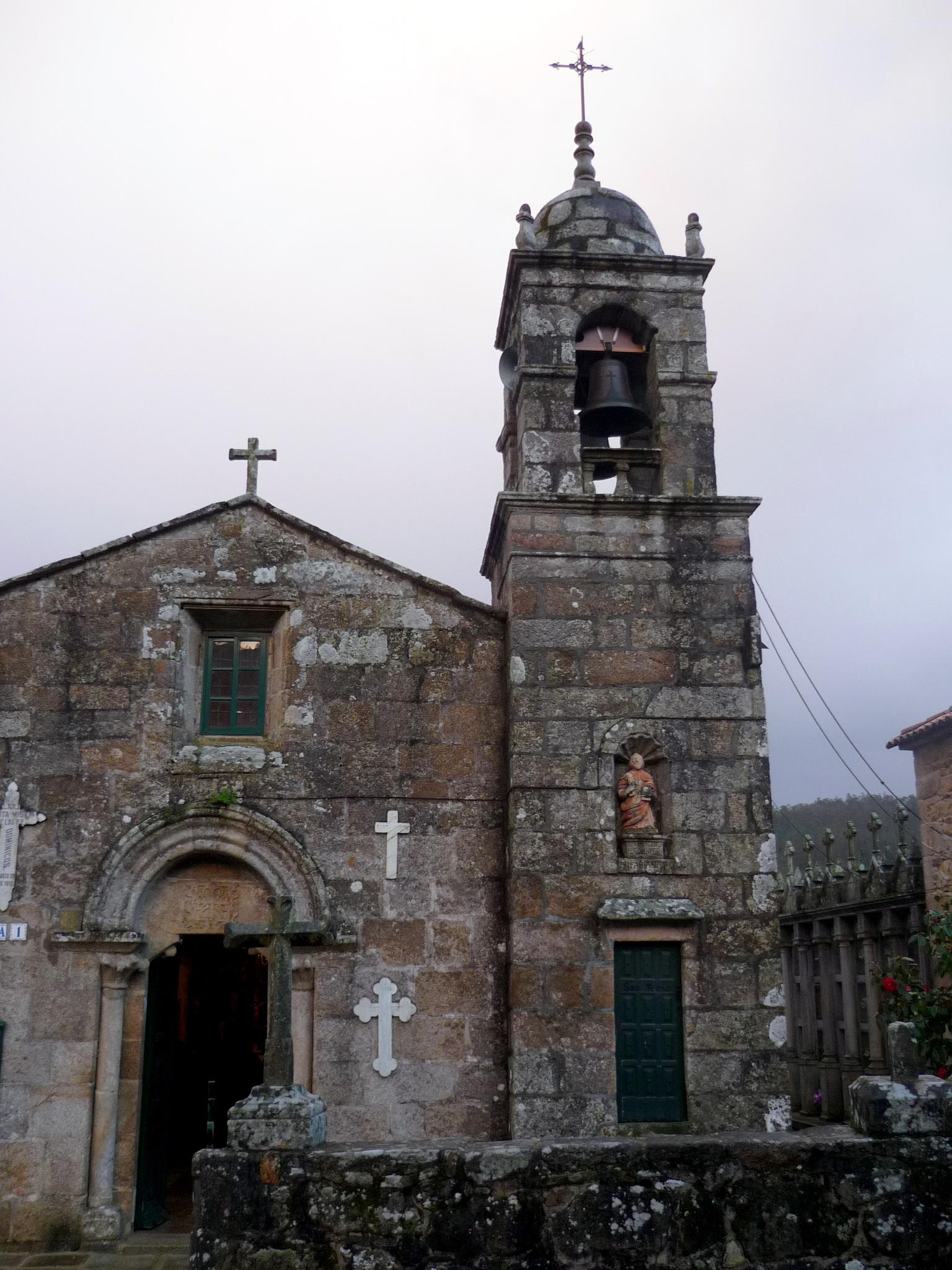 Fronte da Igrexa de Tállara, Lousame